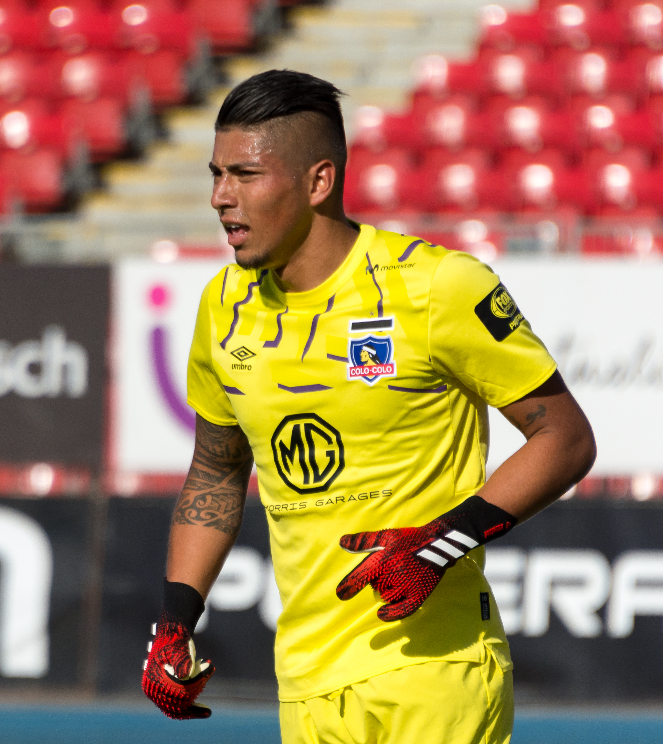 Audax Italiano v Colo-Colo, Estadio Nacional, Ñuñoa, Santiago, Región Metropolitana, Chile